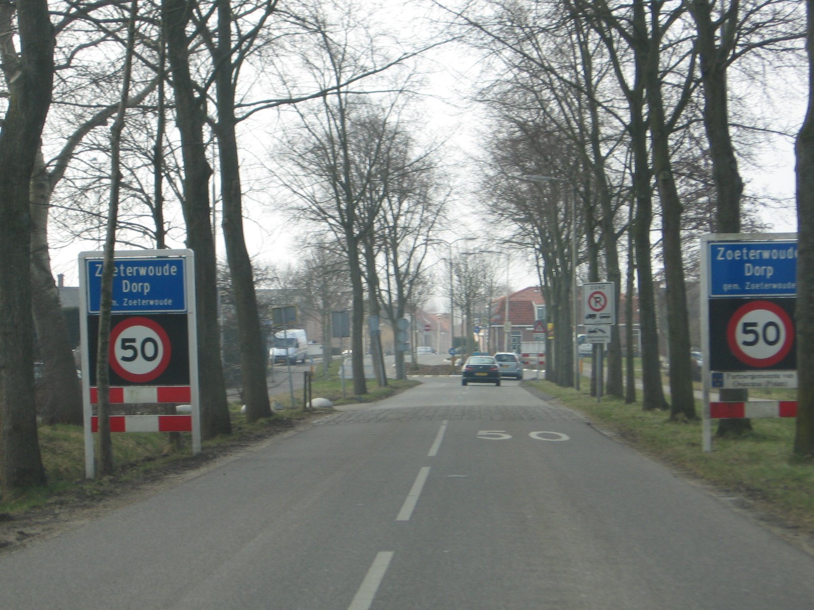 Zoeterwoude and surroundings